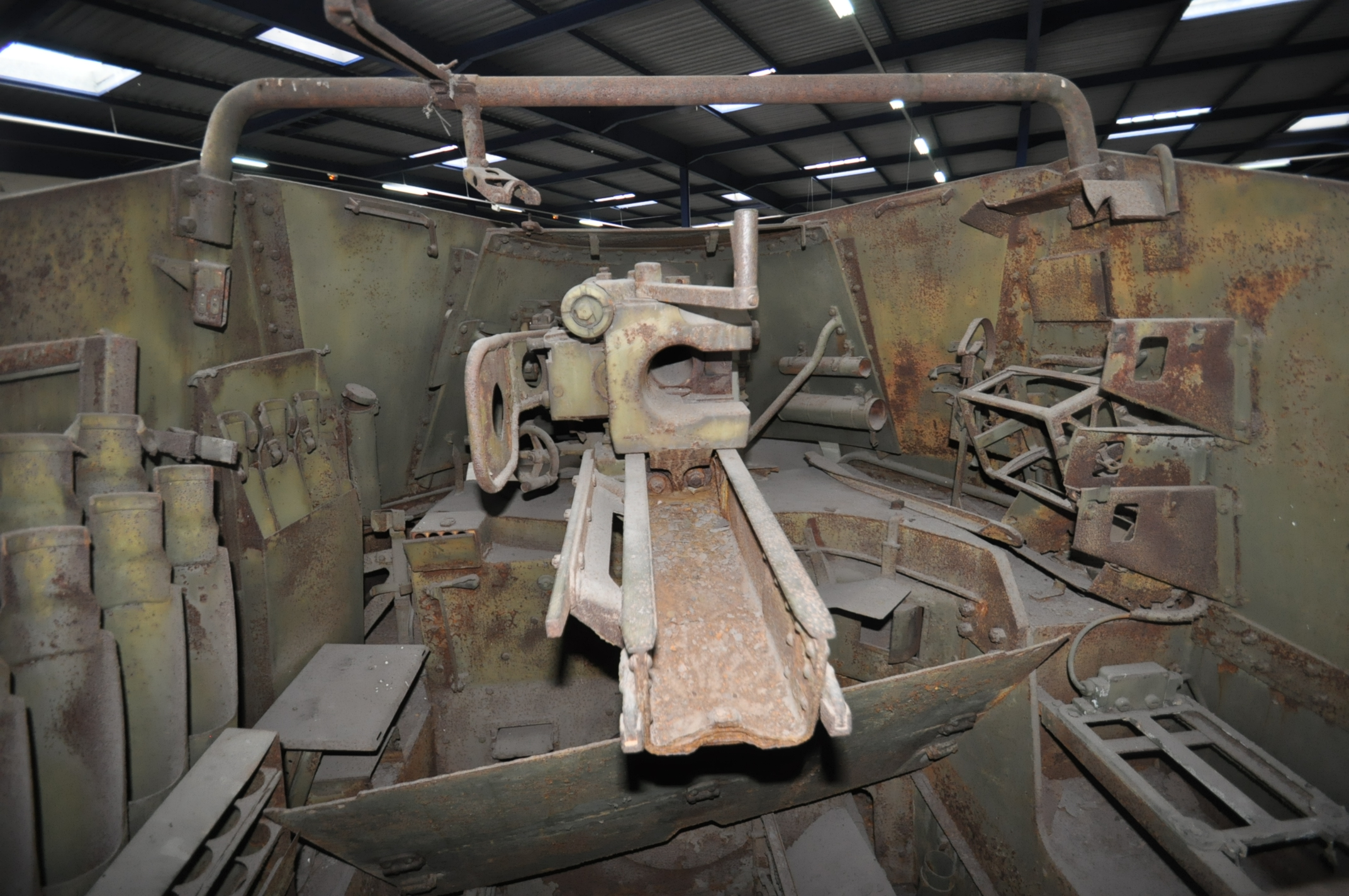 マルダーⅢ（Ｍ）戦闘室